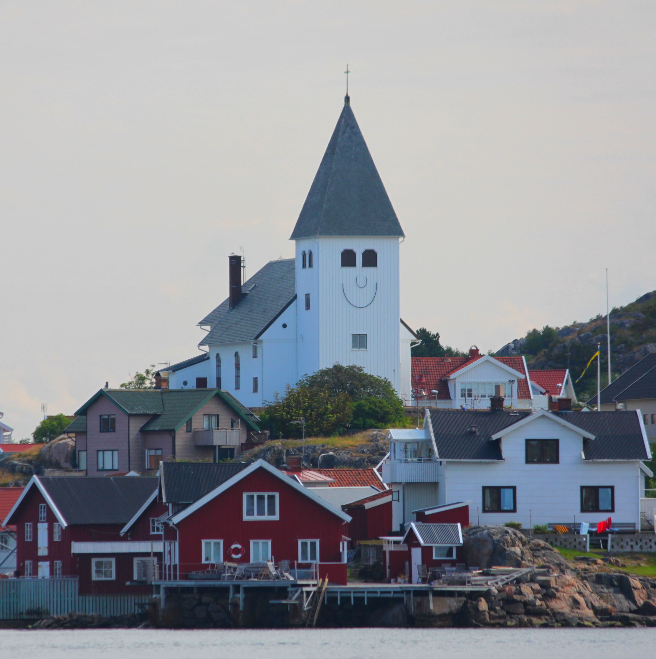 Die lächelnde Kirche von Skärhamn dem Hauptort der Insel Tjörn